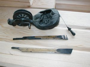 Japanese line marker or